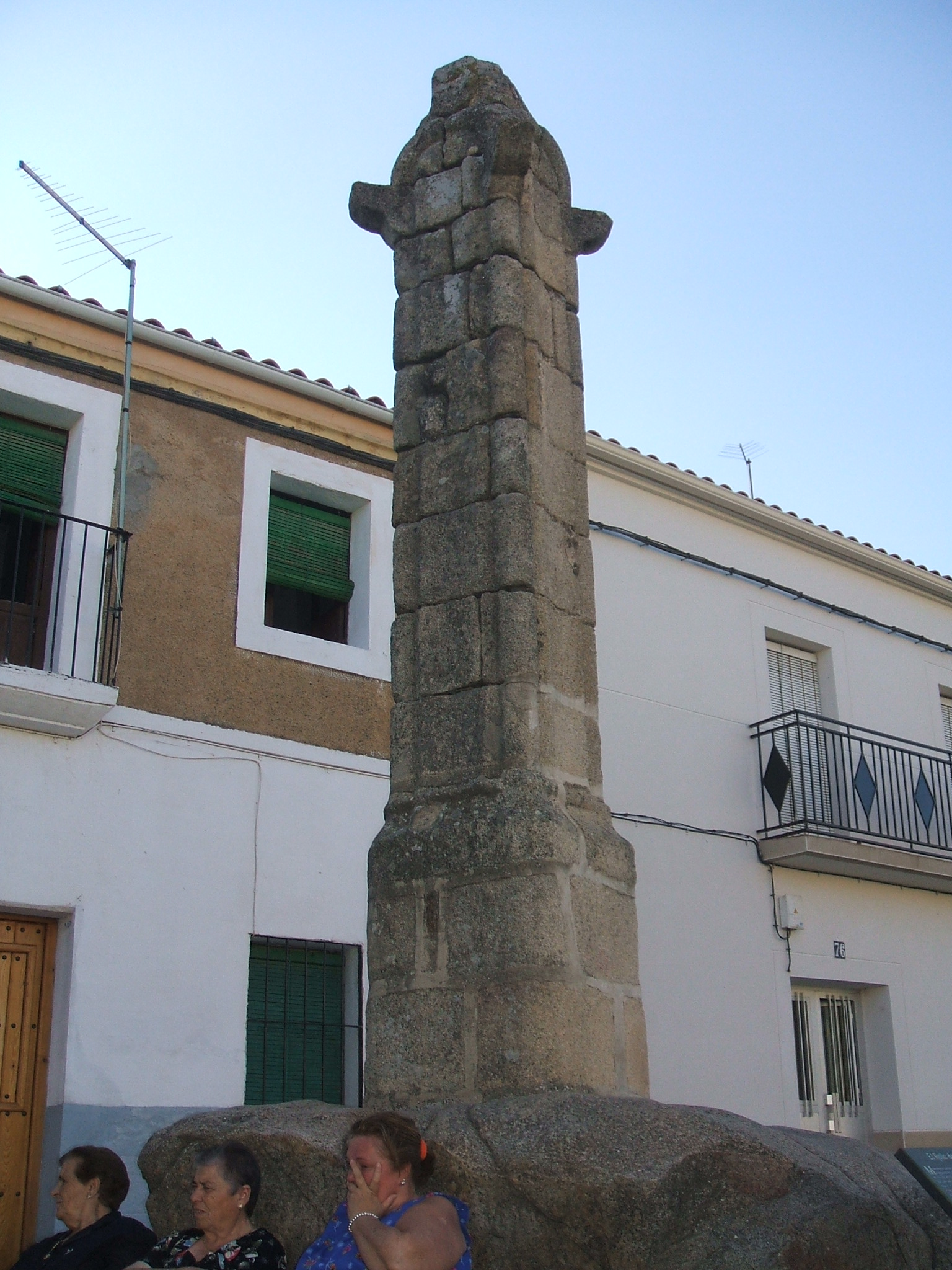 En Arroyo de la Luz (Cáceres, España) se conserva un rollo jurisdiccional.